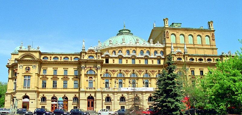 Krakow (Poland) Slowacki Theatre